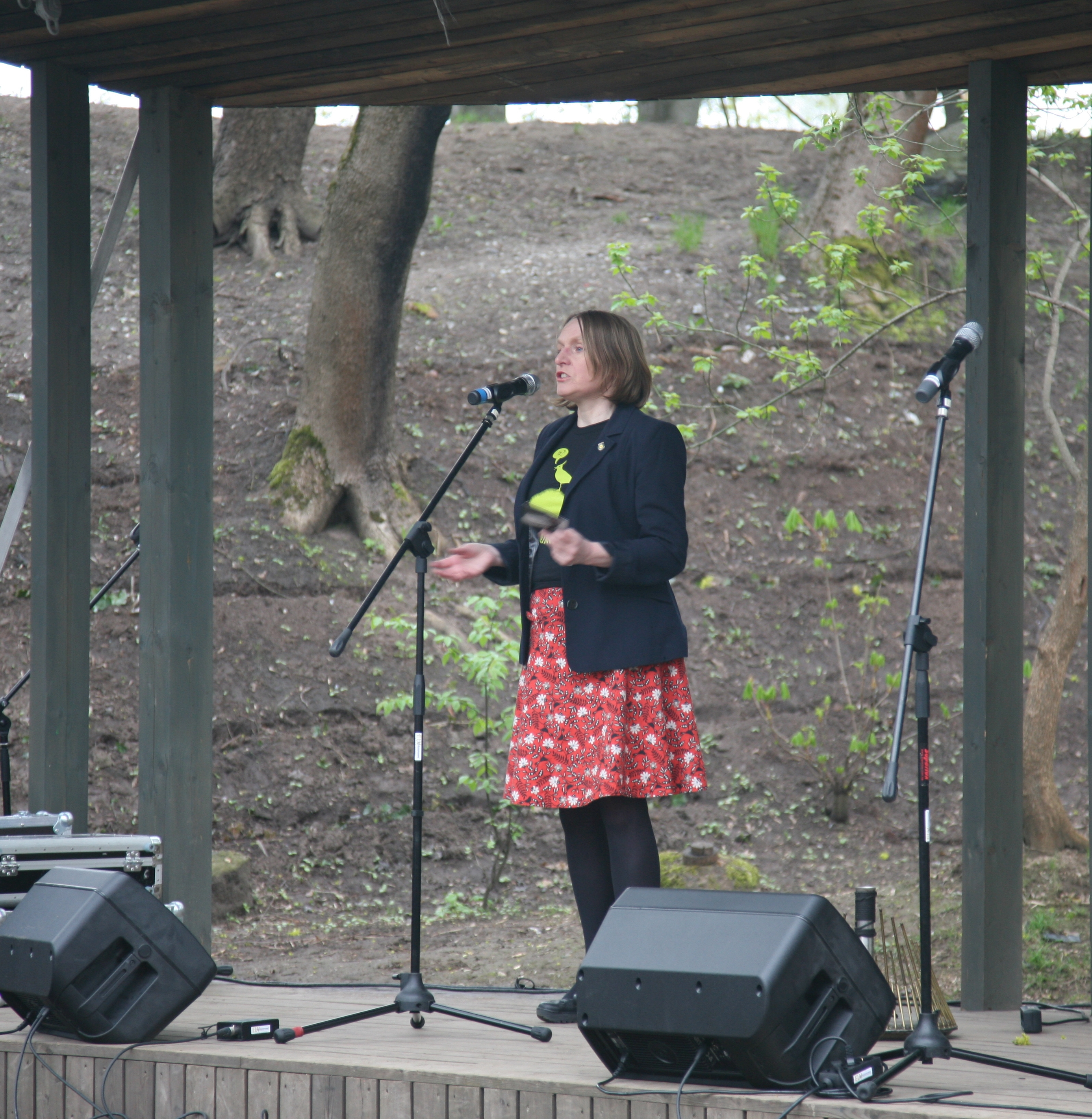 Sarah Angliss Prima Vista 2015 avamisel